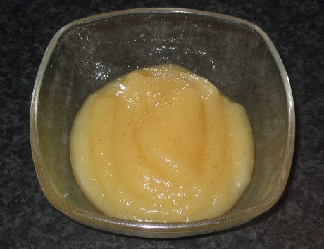 Bakje met appelmoes.